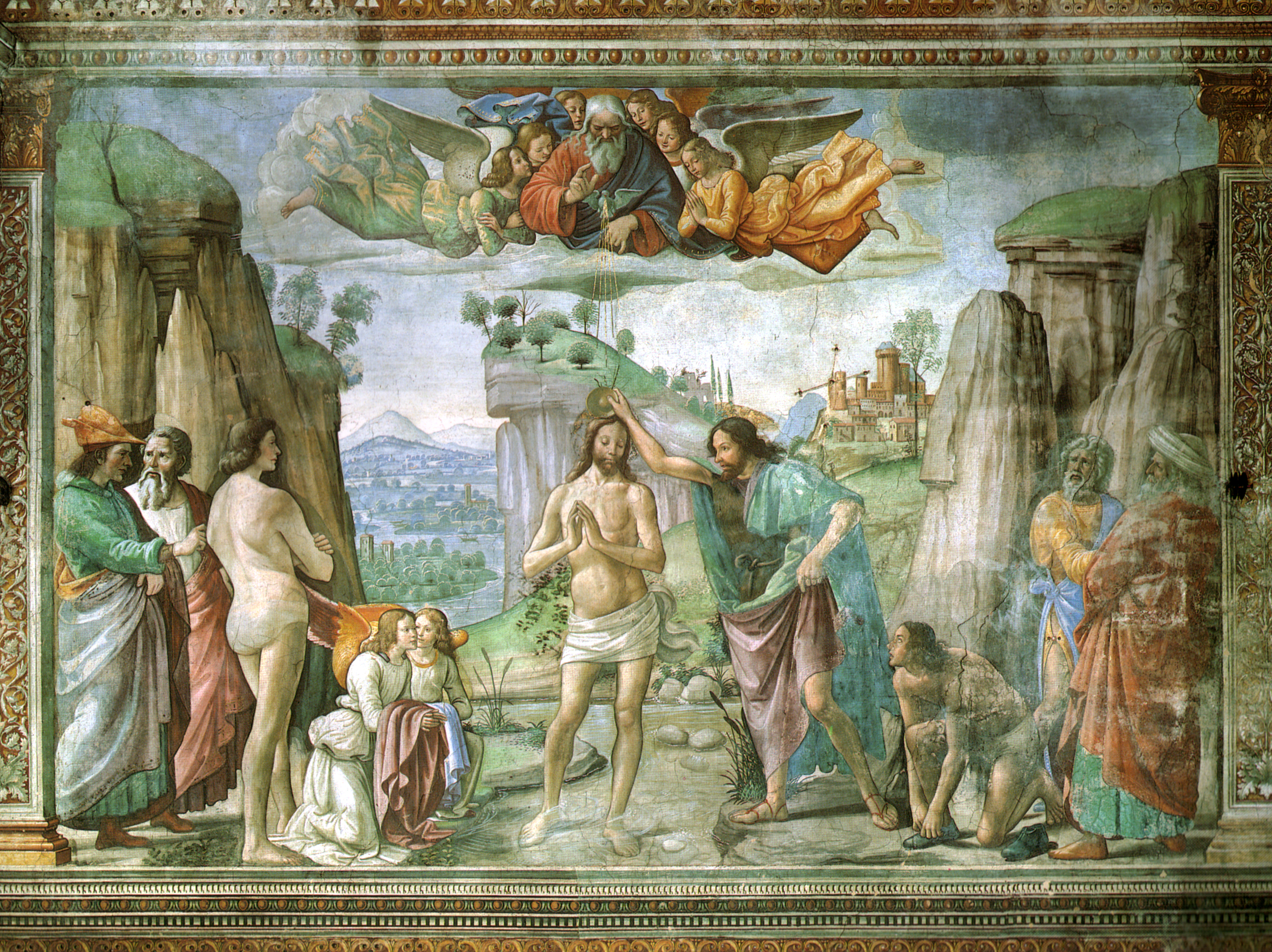 cappella tornabuoni frescoes in florence